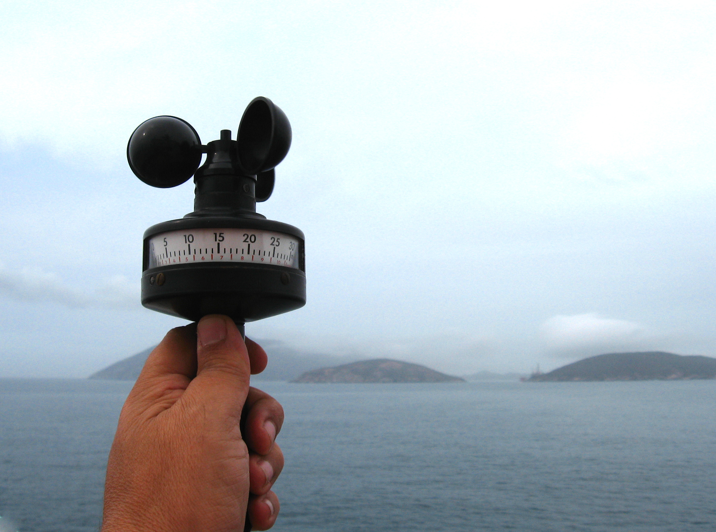 Anemômetro Anemometer Arraial do Cabo - Rio de Janeiro - Brasil